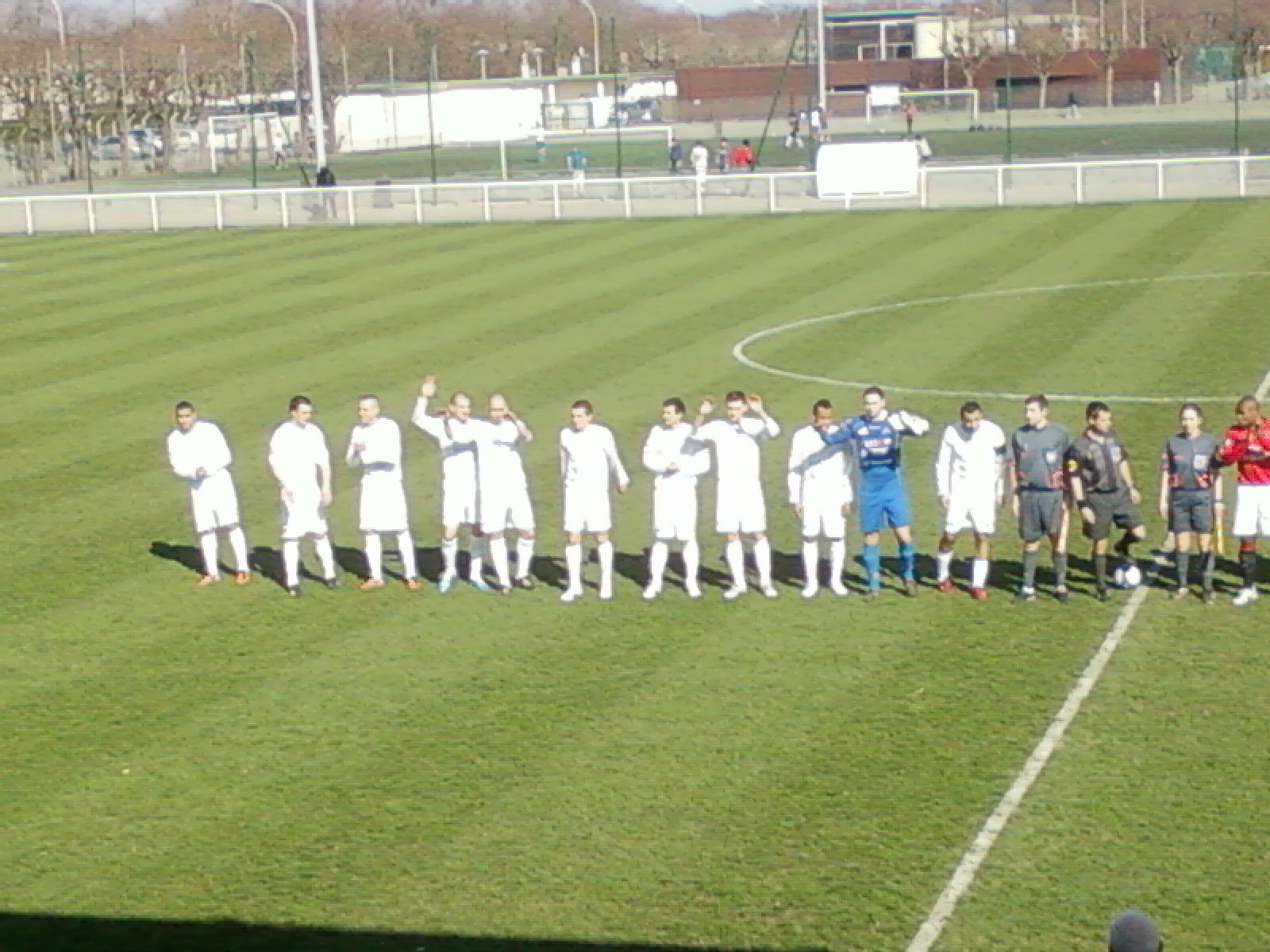 Présentation de l'équipe de l'ASM Belfort lors du match PSG B-Belfort du 20 mars 2011